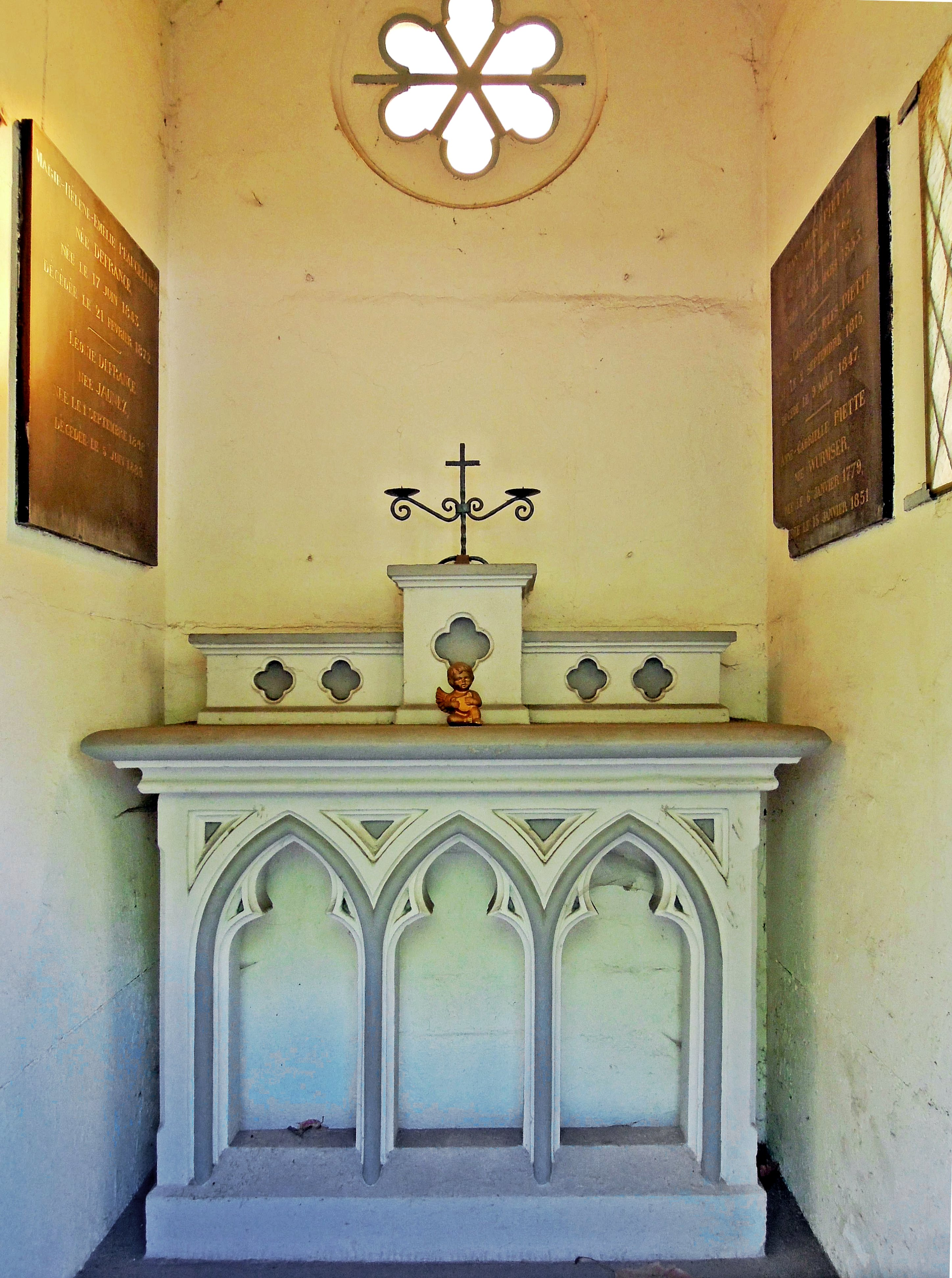 Grabkapelle Defrance in Dillingen